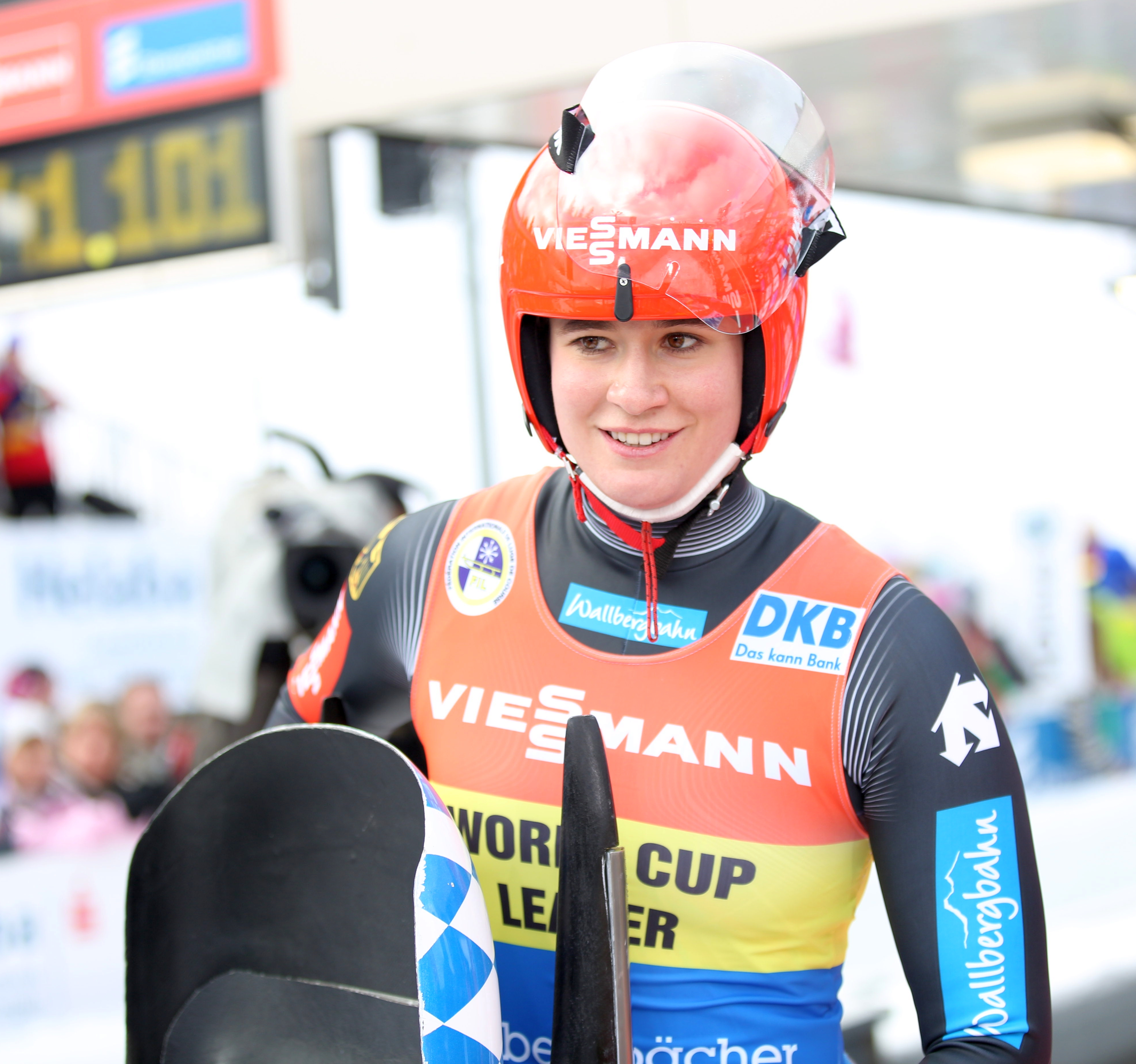 Natalie Geisenberger beim Rennrodel-Weltcup der Damen 2017 in Oberhof